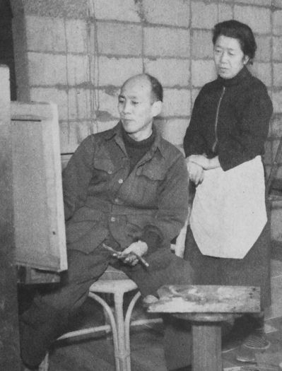 三雲祥之助・小川マリ夫妻